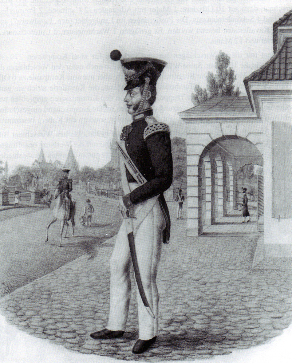 Trommler des Lübecker Militärs an der Holstentor-Wache